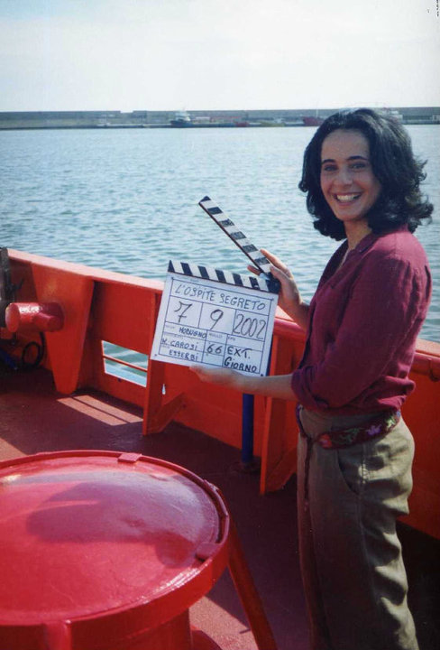 durante la lavorazione di una fiction